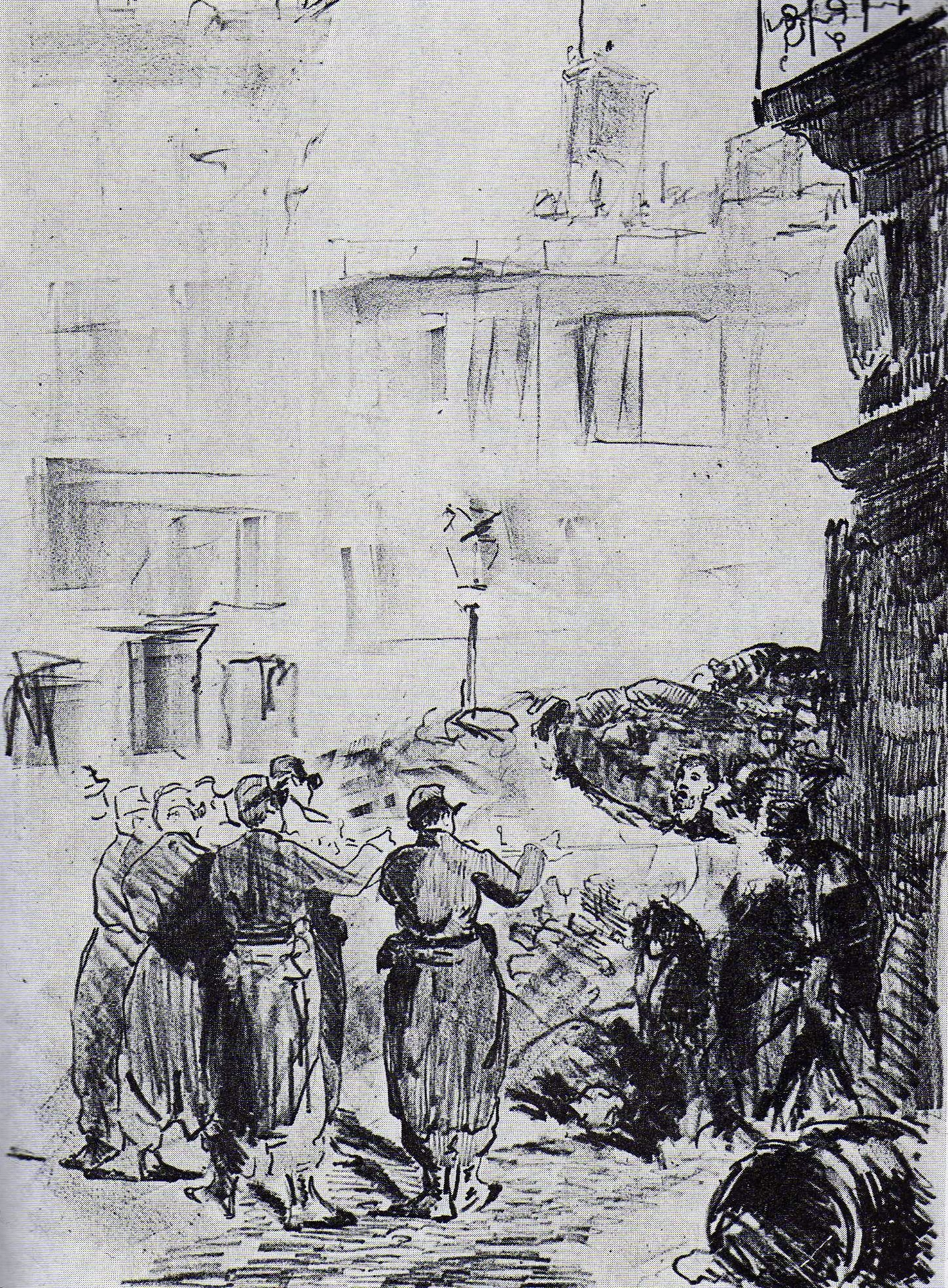 Barricade